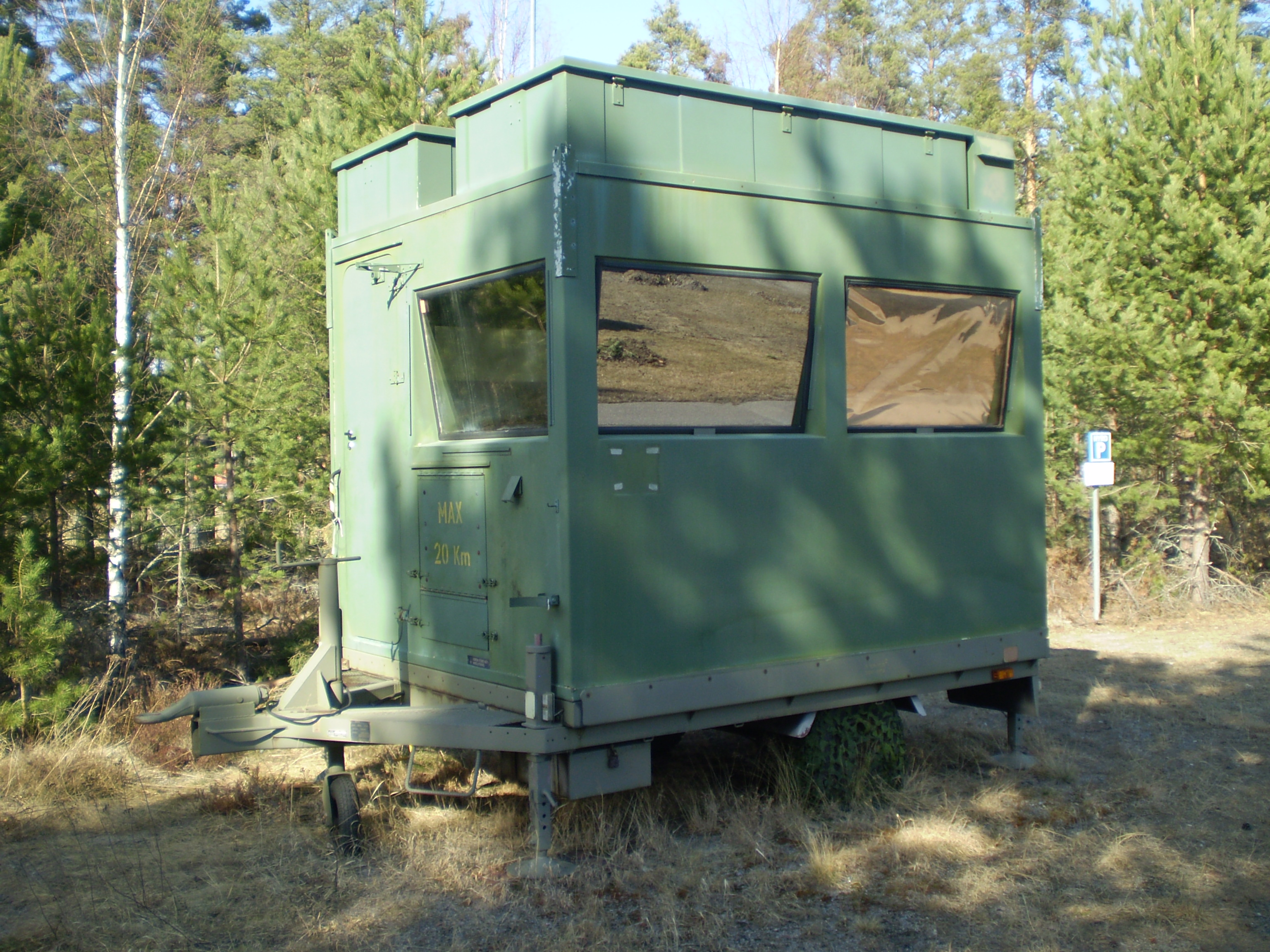 TLF-kärra för Trafikledaren vid fältet i Bas 60-systemet